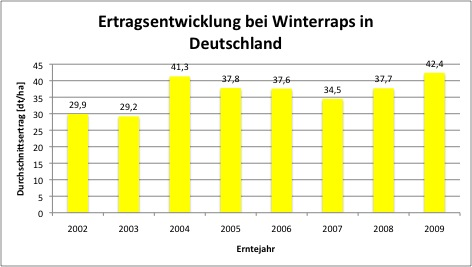 Grafik Durchschnittsertrag Winterraps Deutschland 2002 bis 2006; average yield winter rapeseed canola Germany 2002 to 2006. Datenquelle: heruntergeladen am 2008-04-03.